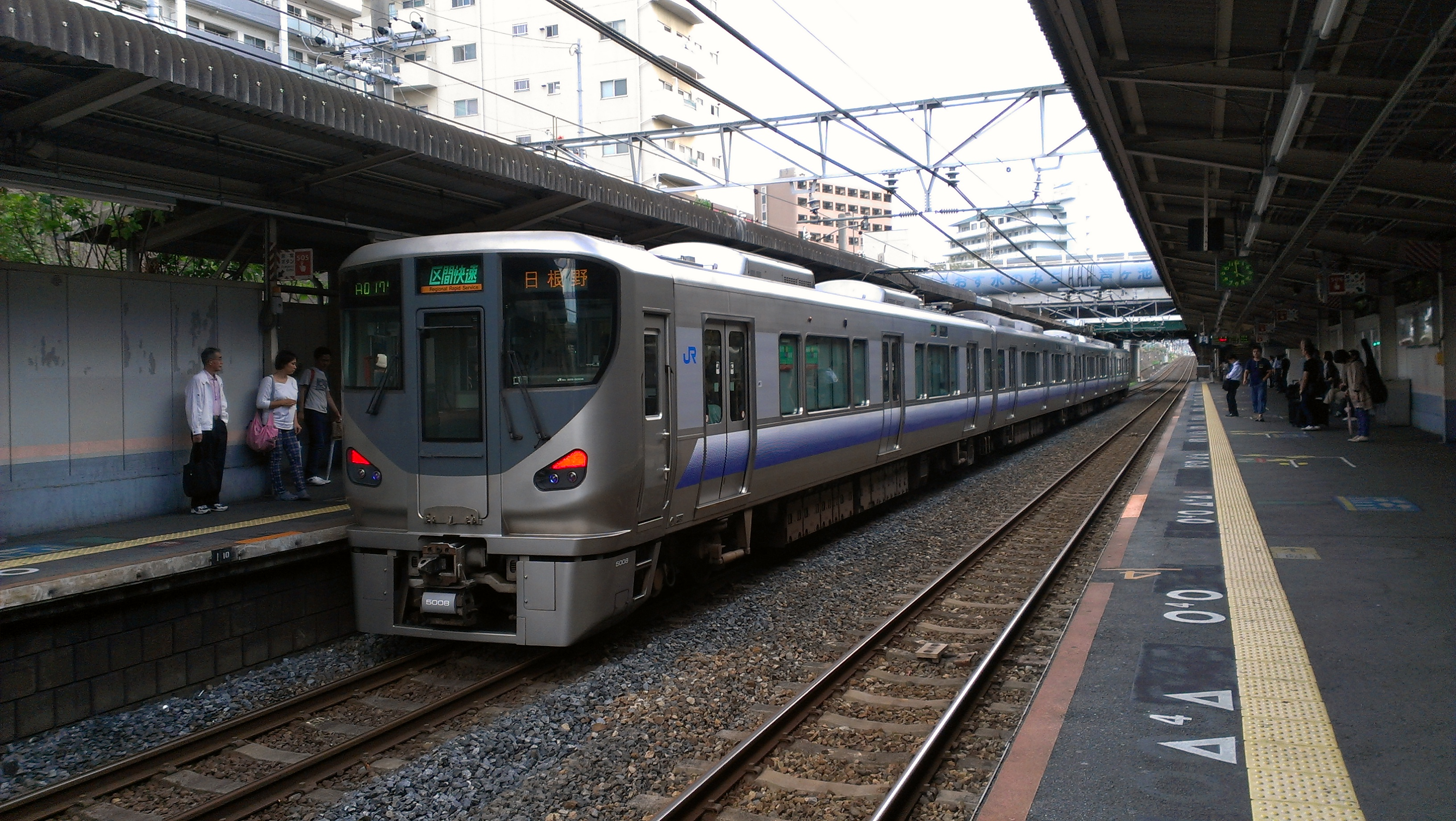 阪和線の区間快速